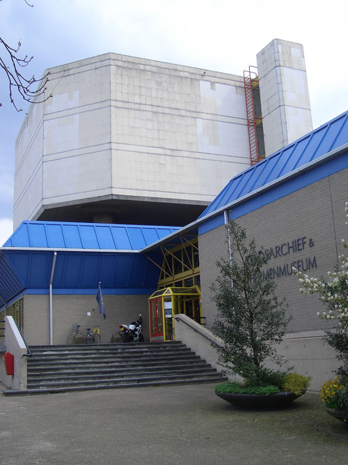 Fotograaf: Nico Habets Thermenmuseum / Stadsarchief Heerlen